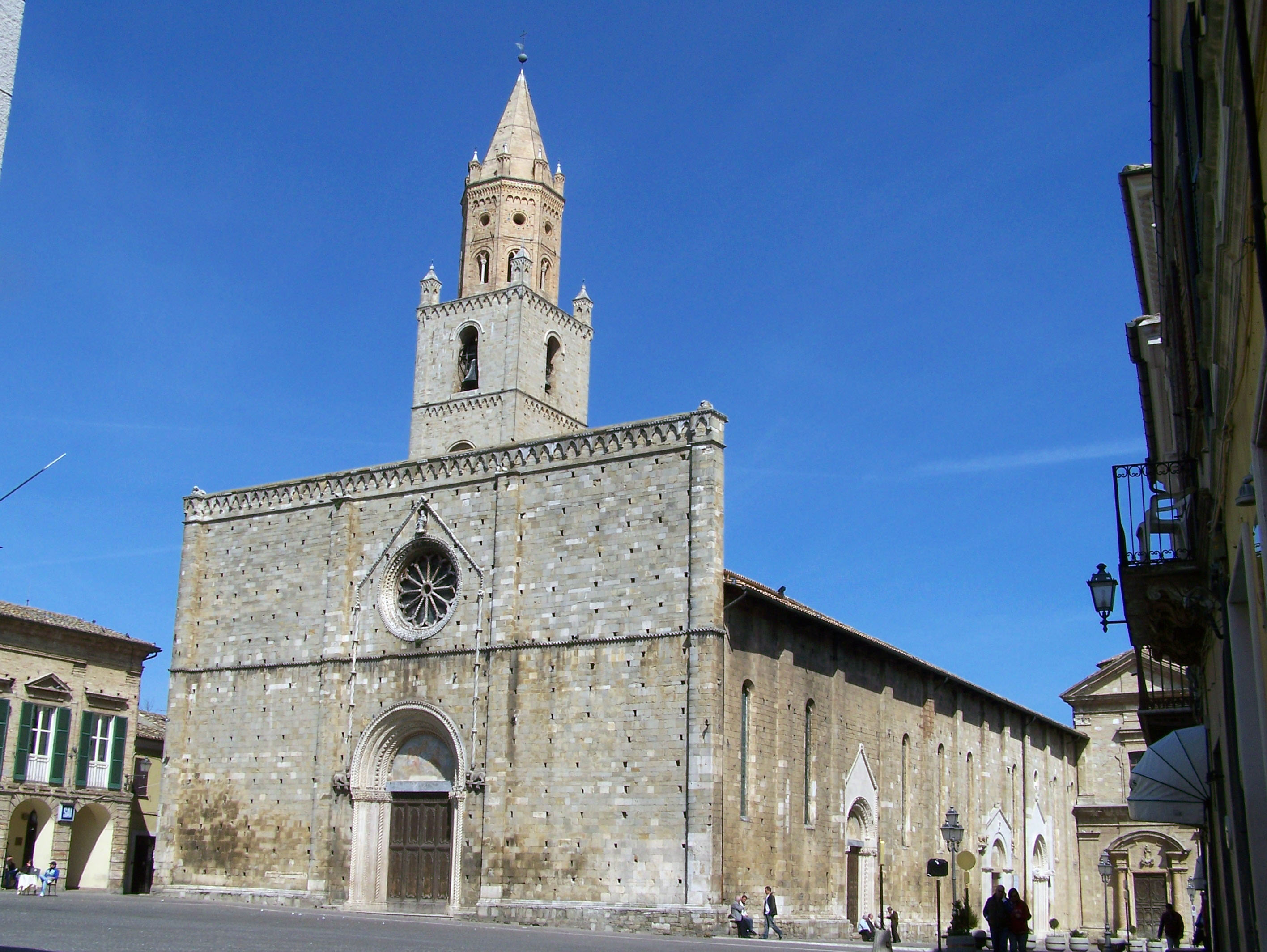 autore: utente tat73 cattedrale di Atri (TE) licenza libera aprile 2006 Categoria:Immagini di Atri